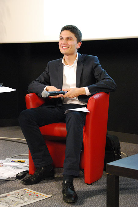 Gilles Vanderpooten invité du Press'tival, festival du journalisme de Chateau-Gontier.